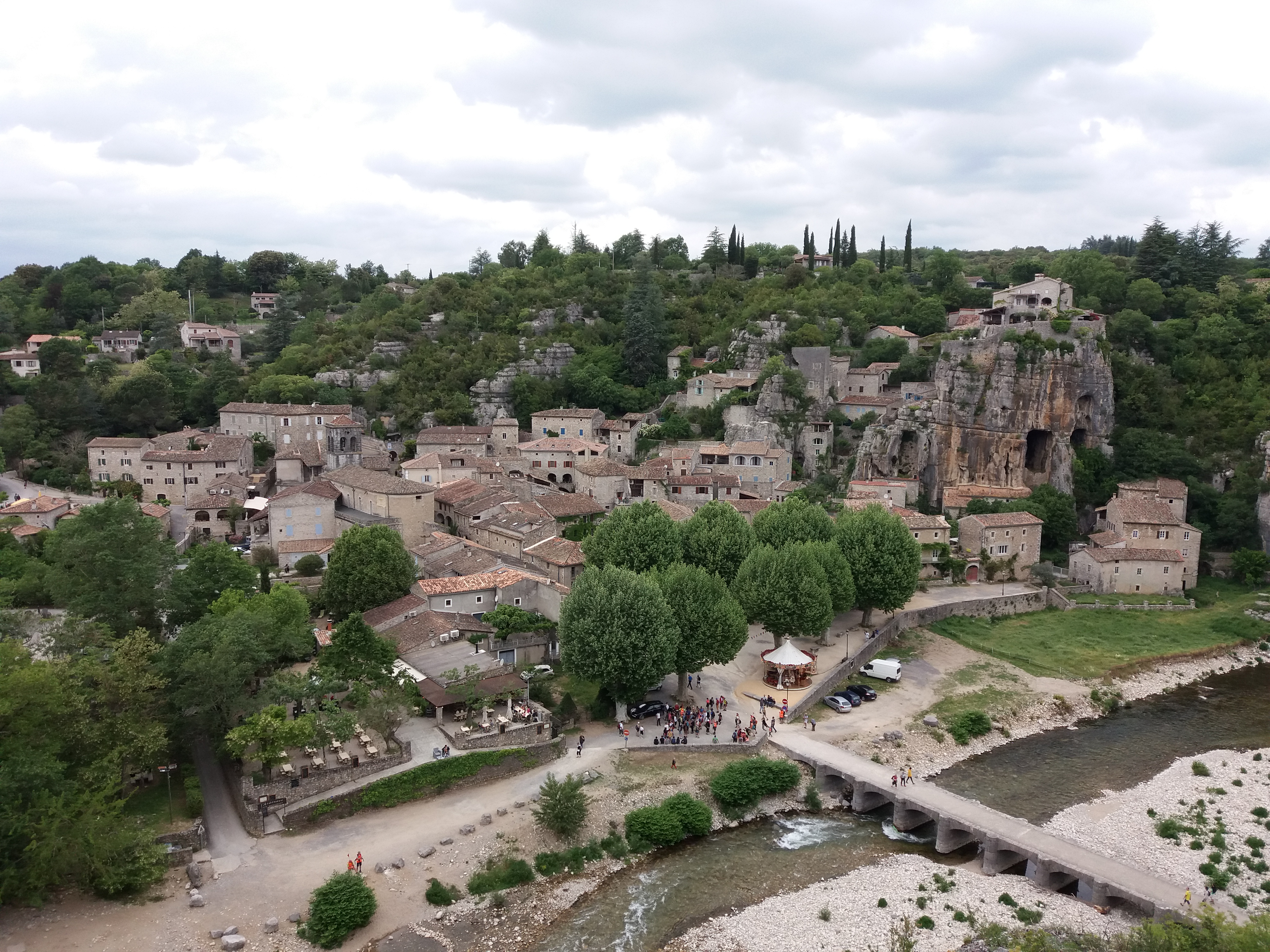 Point de vue.